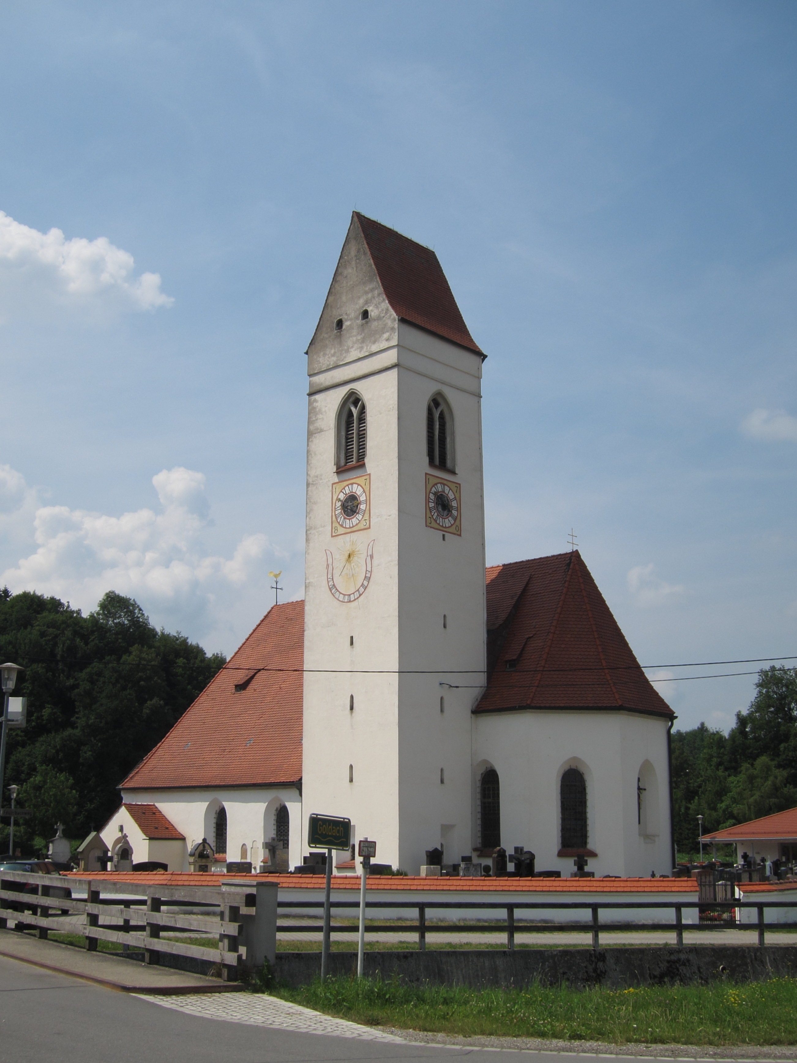 Großschwindau; Filialkirche St. Michael, katholische Filialkirche St. Michael, dreischiffiger Bau mit eingezogenem polygonalem Chorabschluss, angefügter Sakristei und Chorflankenturm, zweite Hälfte 15. Jahrhundert, Barockisierung 1753 und Verlängerung nach Westen und Turm 1782.